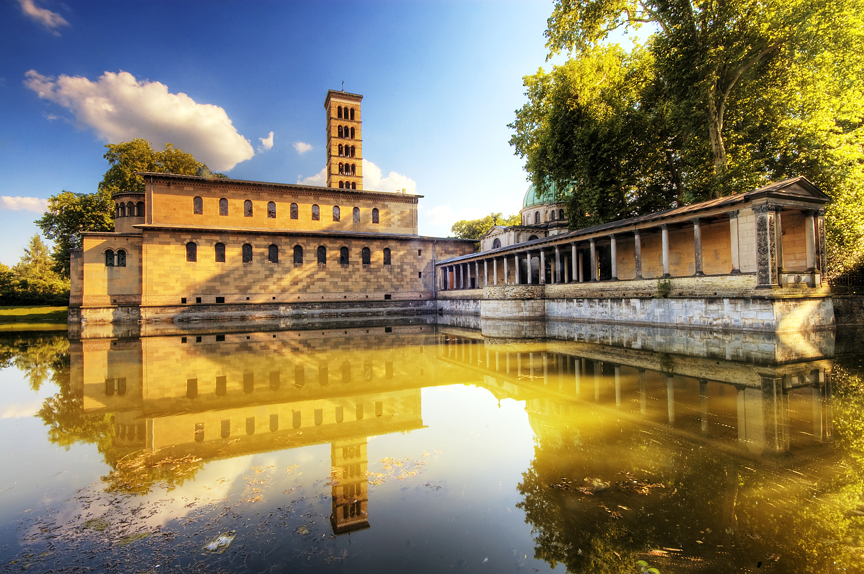 Die Friedenskirche im Schlosspark Sanssouci in Potsdam liegt im so genannten Marlygarten gleich am Grünen Gitter.